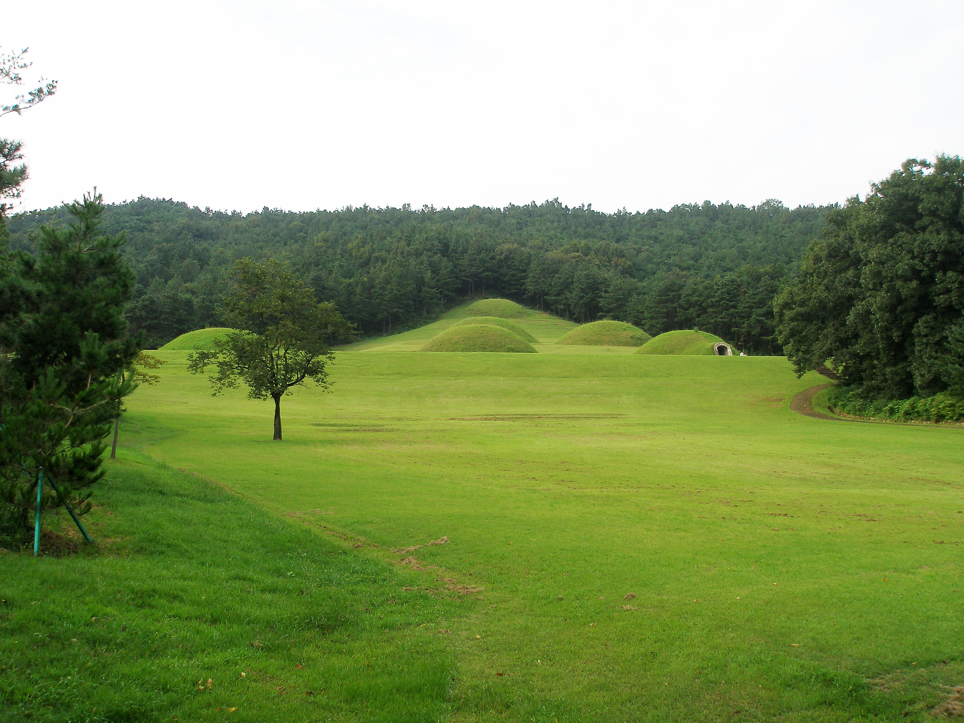 Tombs in Neungsan-ri, Buyeo, Korea